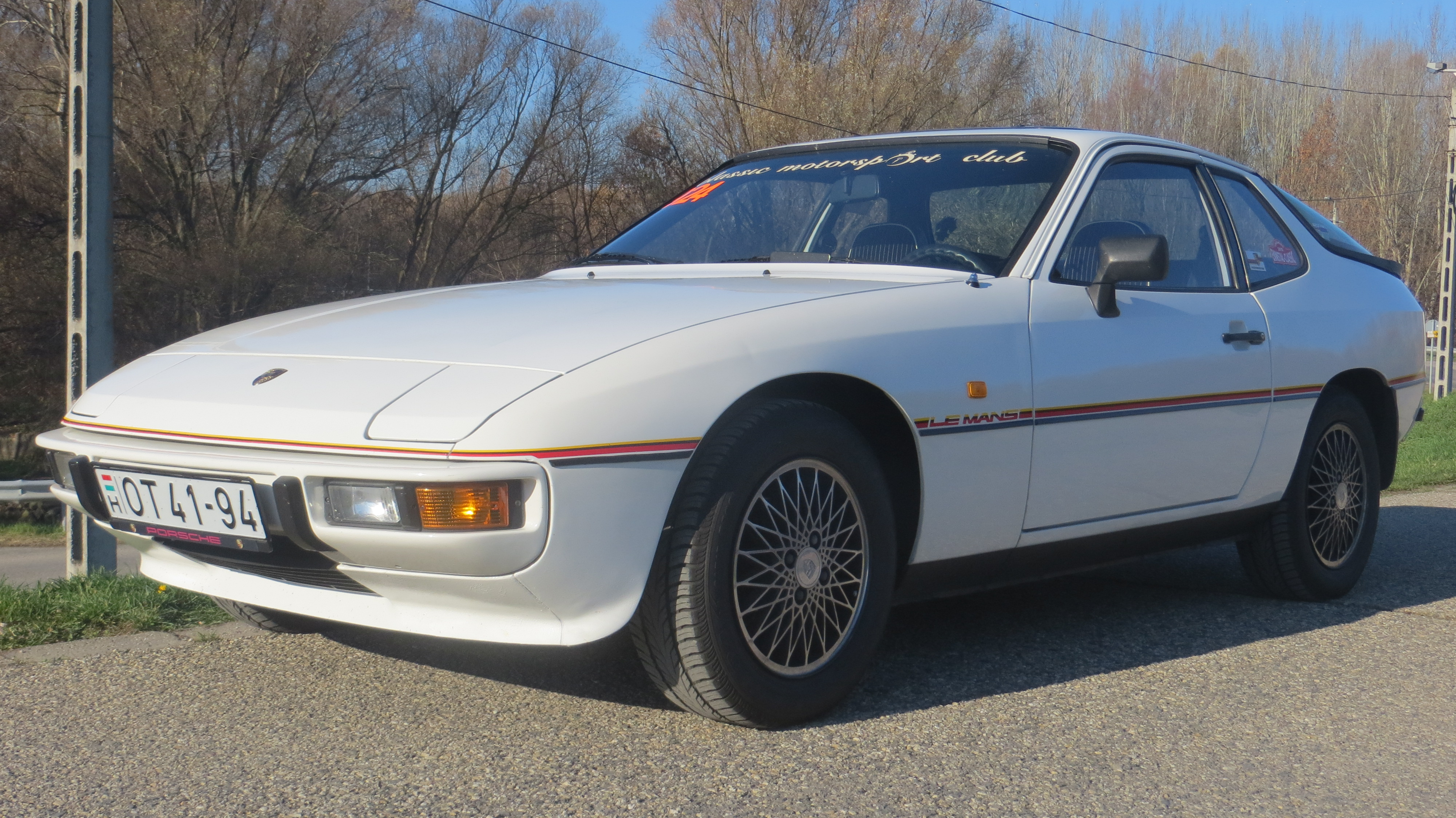 Ez a különleges modell a Porsche Le Mans-i 24 órás autóversenyeken elért hatalmas sikerei előtti tisztelgés. Összesen 1002 darab (más források szerint 1030) épült a modellből, mindegyik alpesifehér színben, körbefutó sárga-fekete-vörös díszítő csíkkal, az első sárvédőkön ugyanilyen színű Le Mans felirattal. A modellen a 924 Turbo hátsó spoilere van, 6J×15-ATS Turbo-Look keréktárcsák, belül csíkos „Nadelstreifen” kárpitozású Turbo ülések fehér szegéllyel, 36 cm átmérőjű négyküllős bőrkormány, bőr váltógomb, az ajtóküszöbön fekete alapon fehér 924 felirat. A gépkocsihoz többféle extrát is lehetett rendelni, elektromos ablakot, elektromosan állítható külső tükröket, hátsó ablaktörlőt, fényszórómosót, légkondicionálót és kivehető targatetőt is. Jobbkormányos kivitelben 100 darab készült.